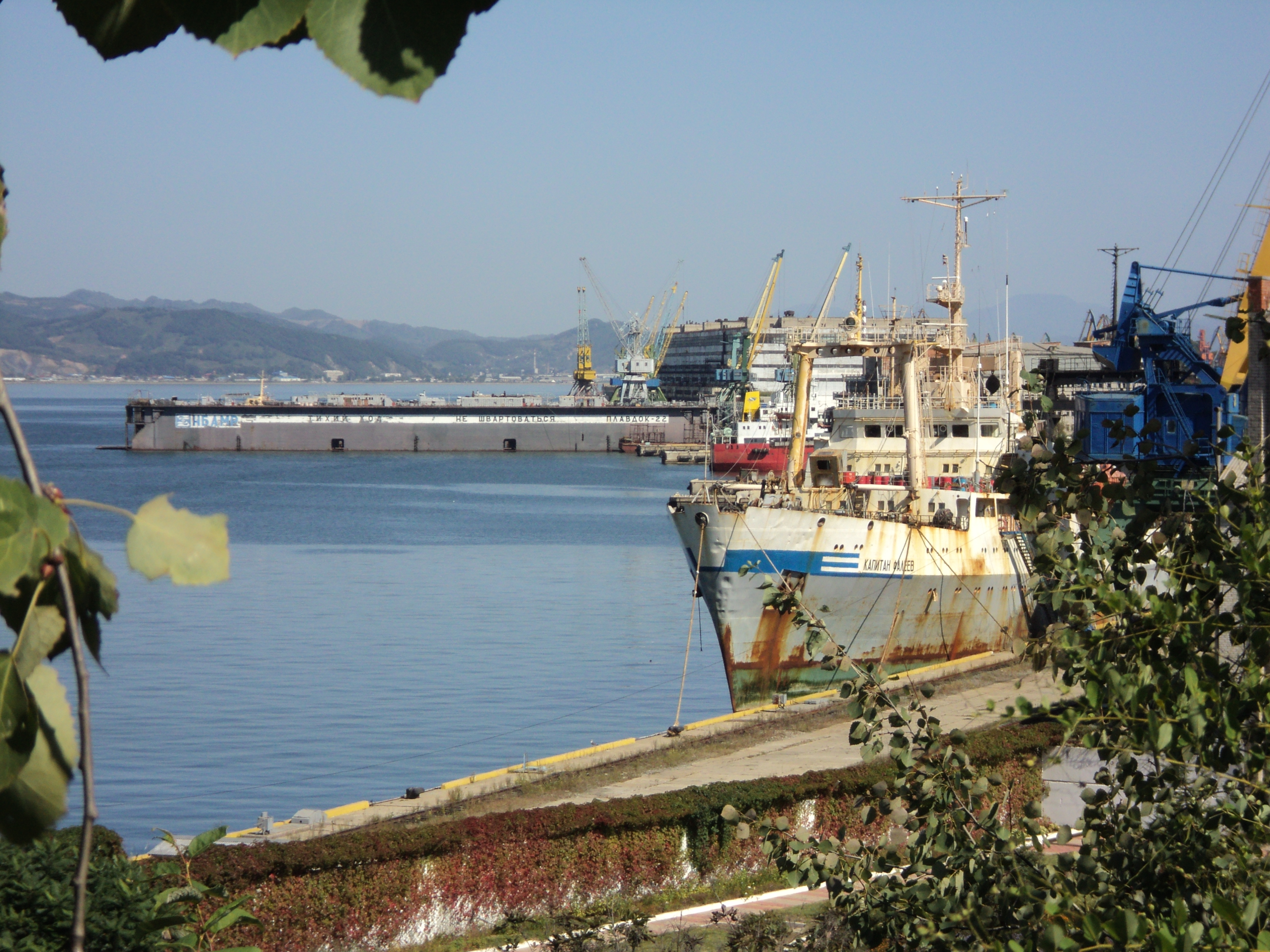 Находкинская база активного морского рыболовства